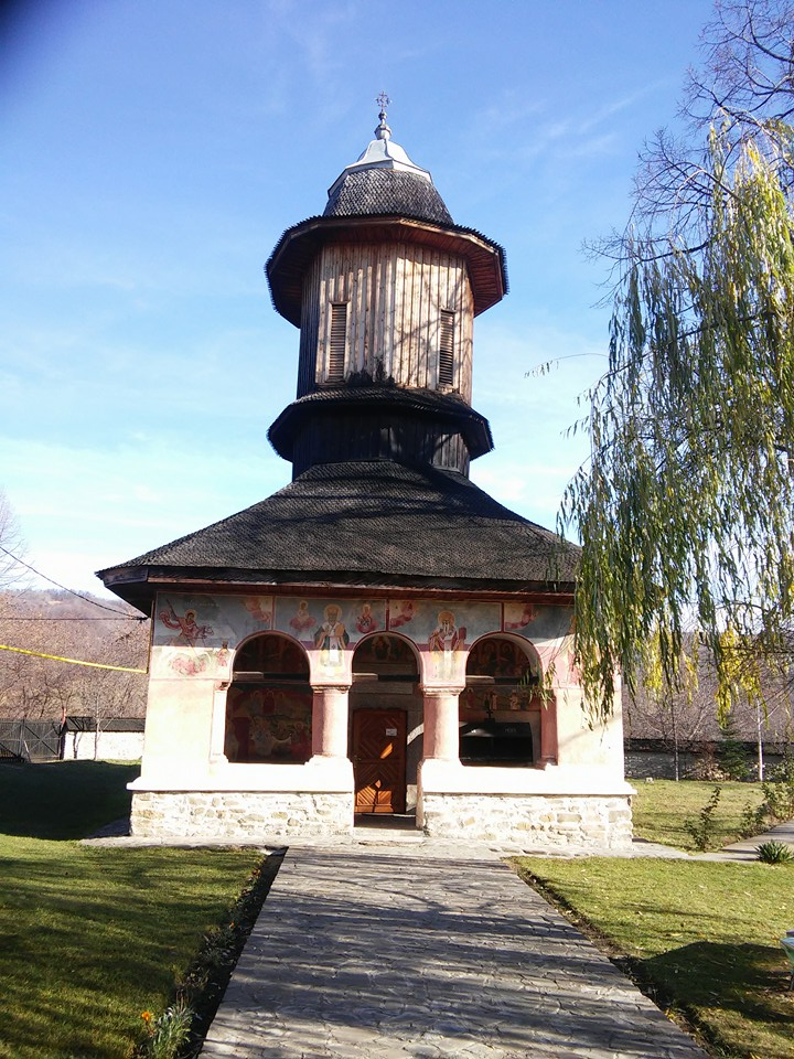 Biserica „Sf. Nicolae”-Tabaci 01